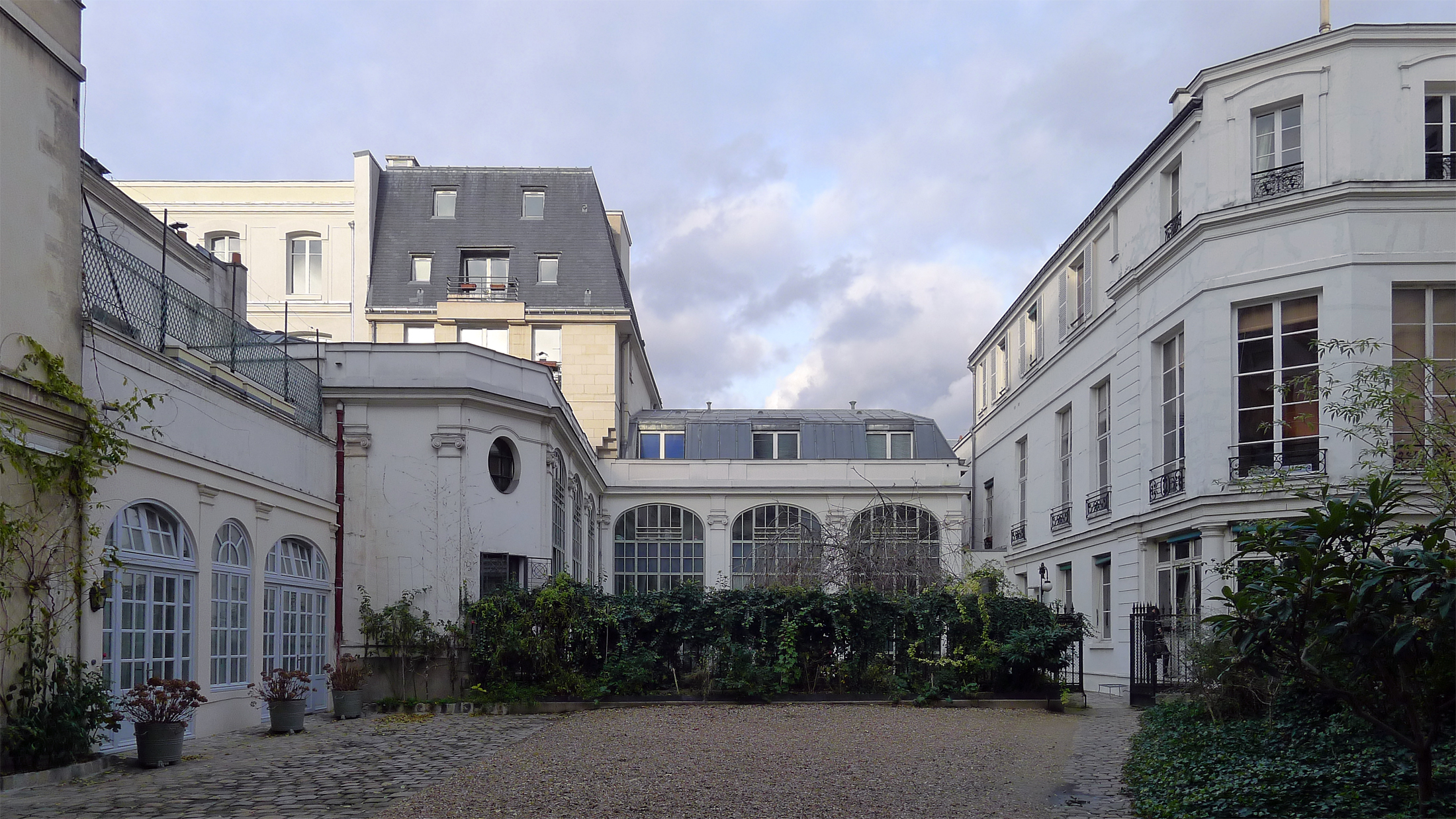 Place des Vosges (n°21 cour intérieure) - Paris III